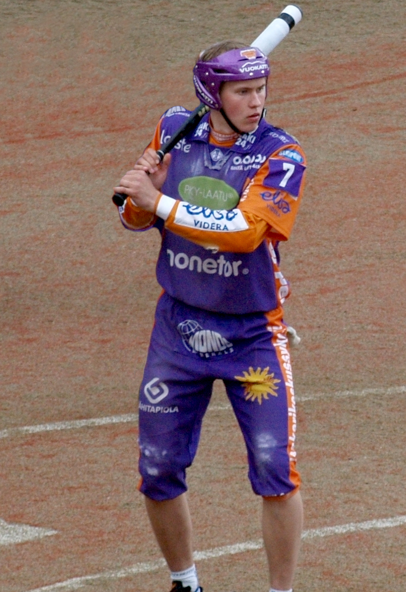 Markus Tuikka ottelussa Vimpelin Veto - Sotkamon Jymy (19.7.2015)